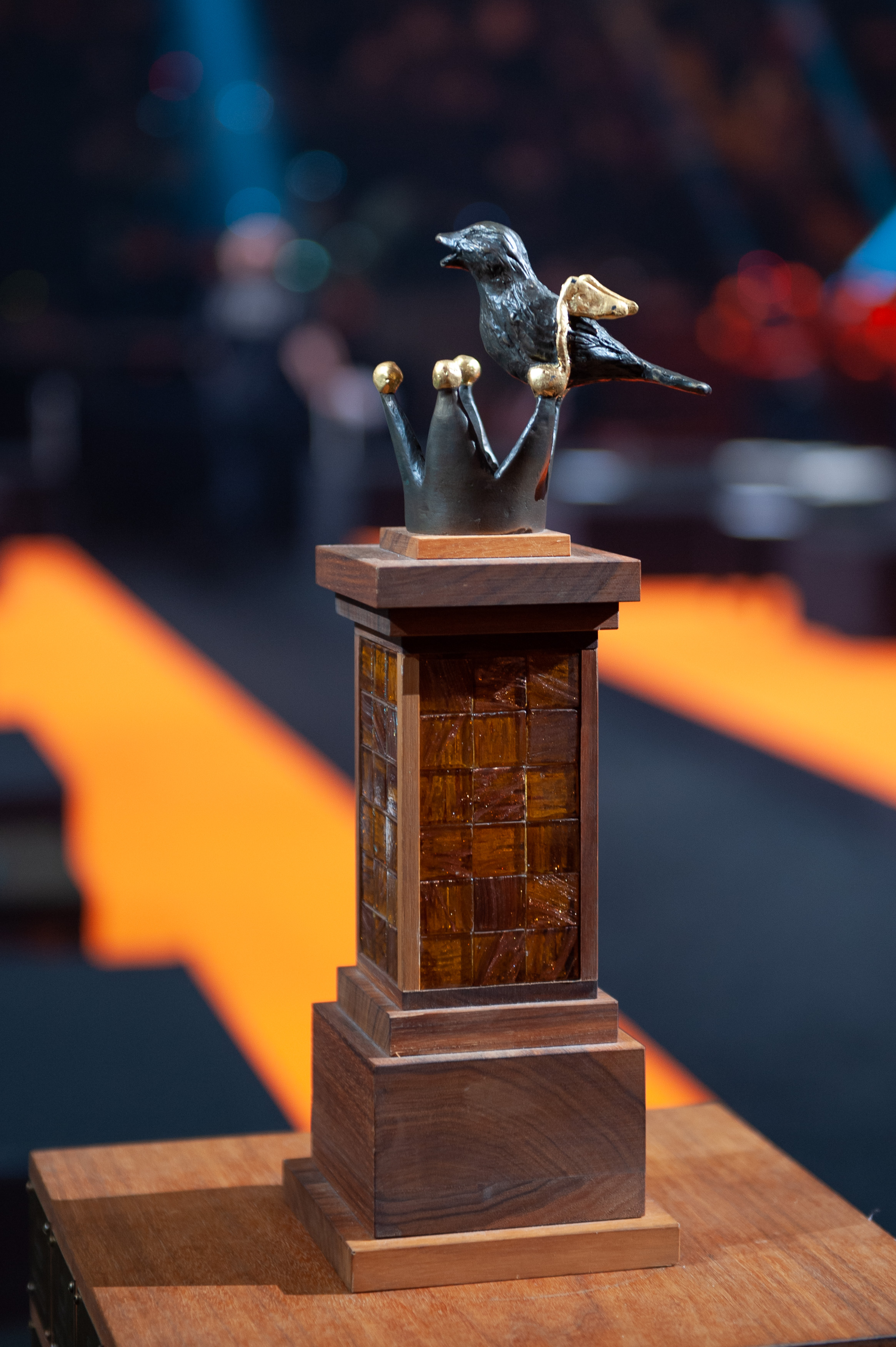 Sångfågeln, Melodifestivalen 2019, Final, Friends Arena, Solna